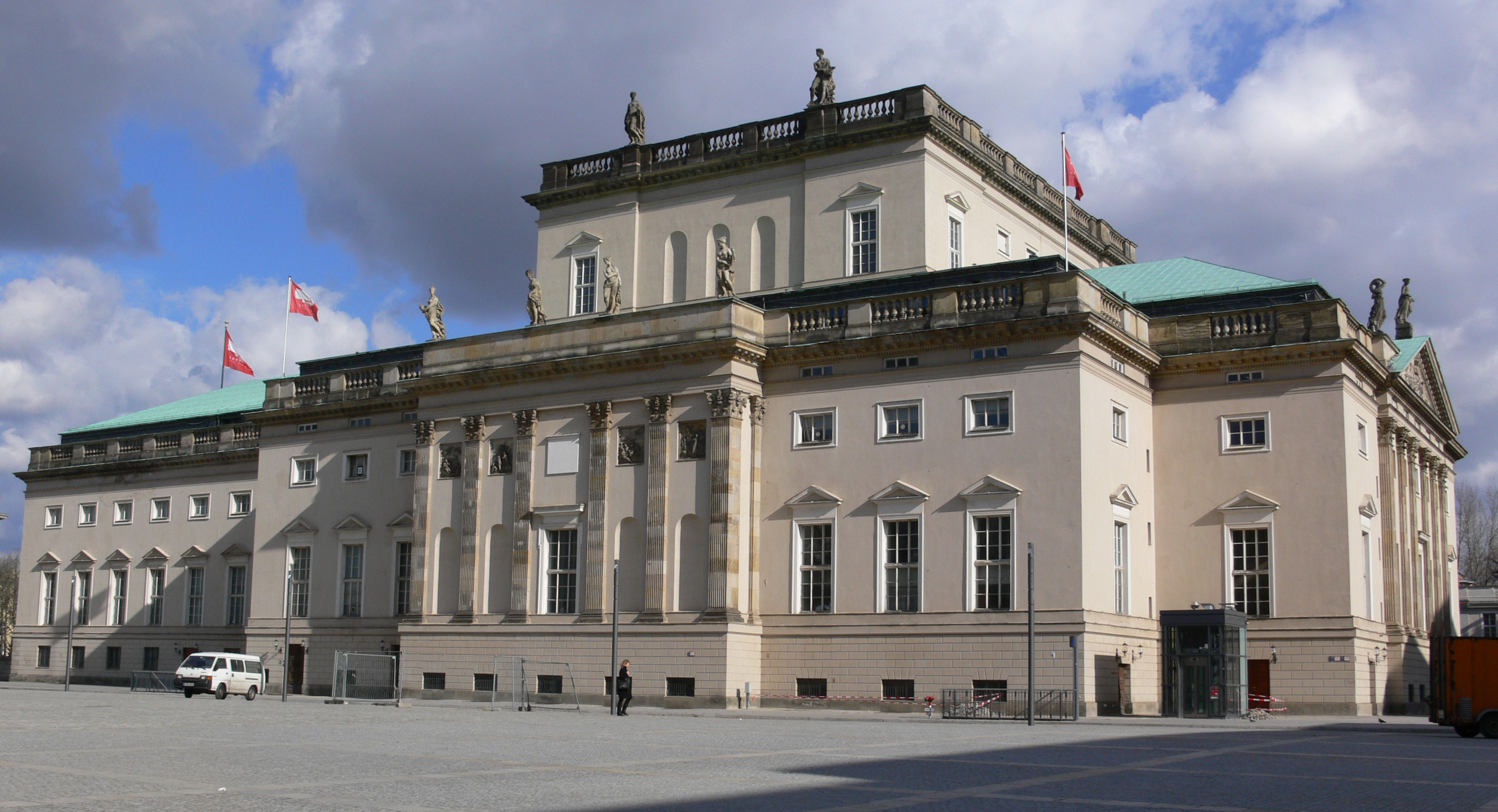 Staatsoper Unter den Linden, Blick vom Bebelplatz